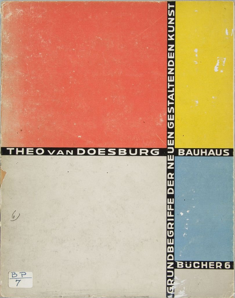 Cover of Theo van Doesburgs Grundbegriffe der neuen gestaltenden Kunst [from the series Bauhausbücher, volume 6]. München: Albert Langen Verlag, 1925. Instituut Collectie Nederland (inv.nr. AB5949).